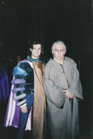 Игорь Манько и Дмитрий Хворостовский на спектакле "Риголетто" в театре "Новая опера"